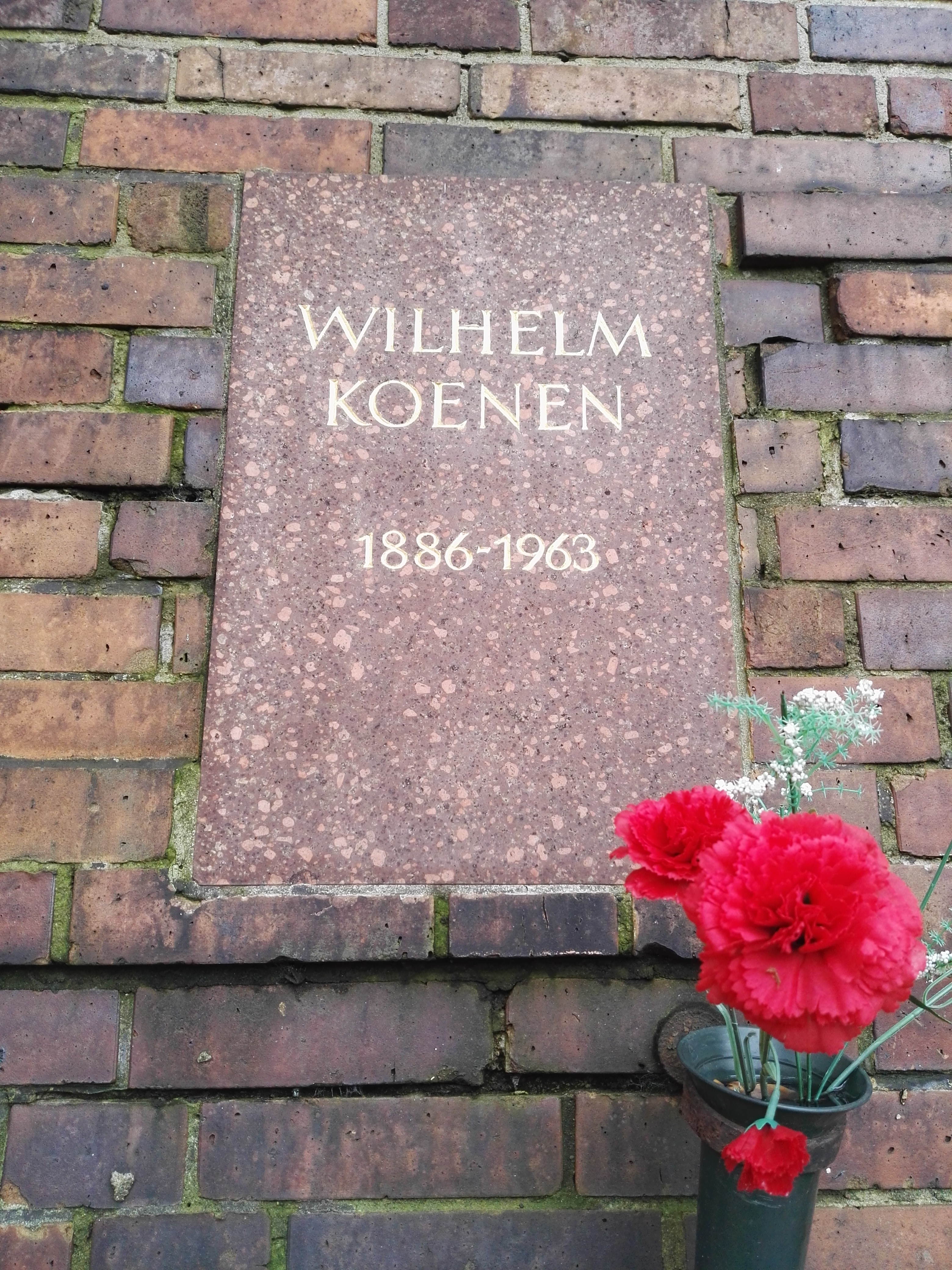 Grab von Wilhelm Koenen in der Gedenkstätte der Sozialisten auf dem Zentralfriedhof Friedrichsfelde in Berlin-Lichtenberg